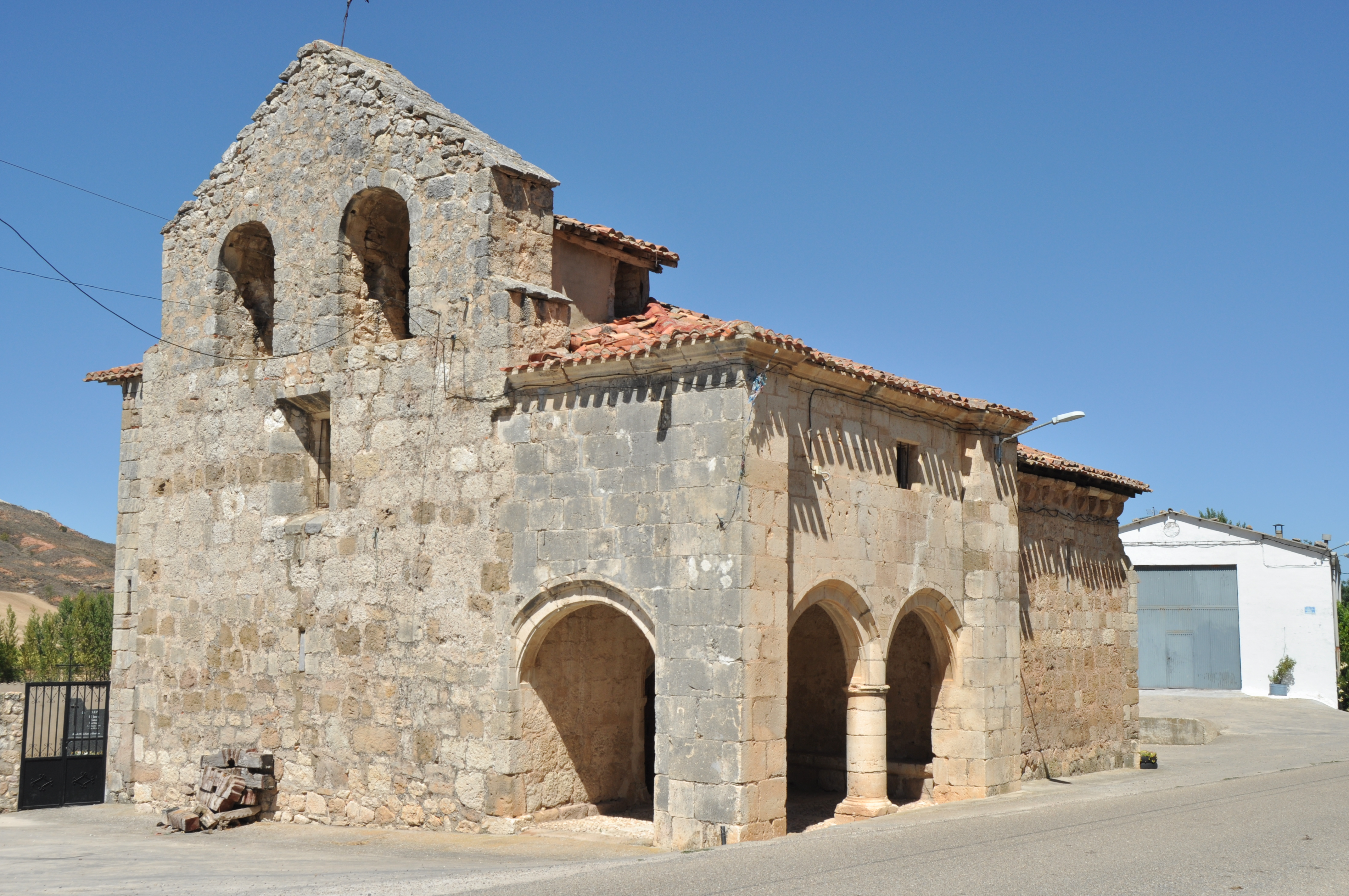 Quintanaurria (Carcedo de Bureba) - 001